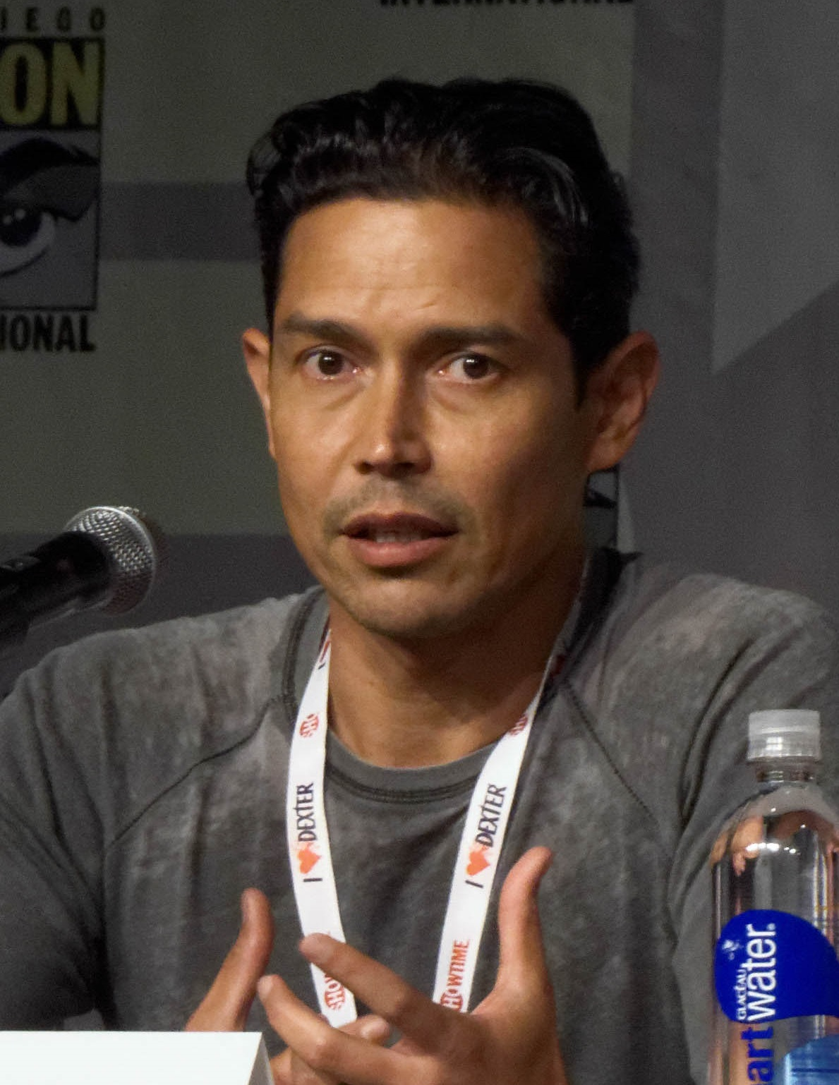 comic con